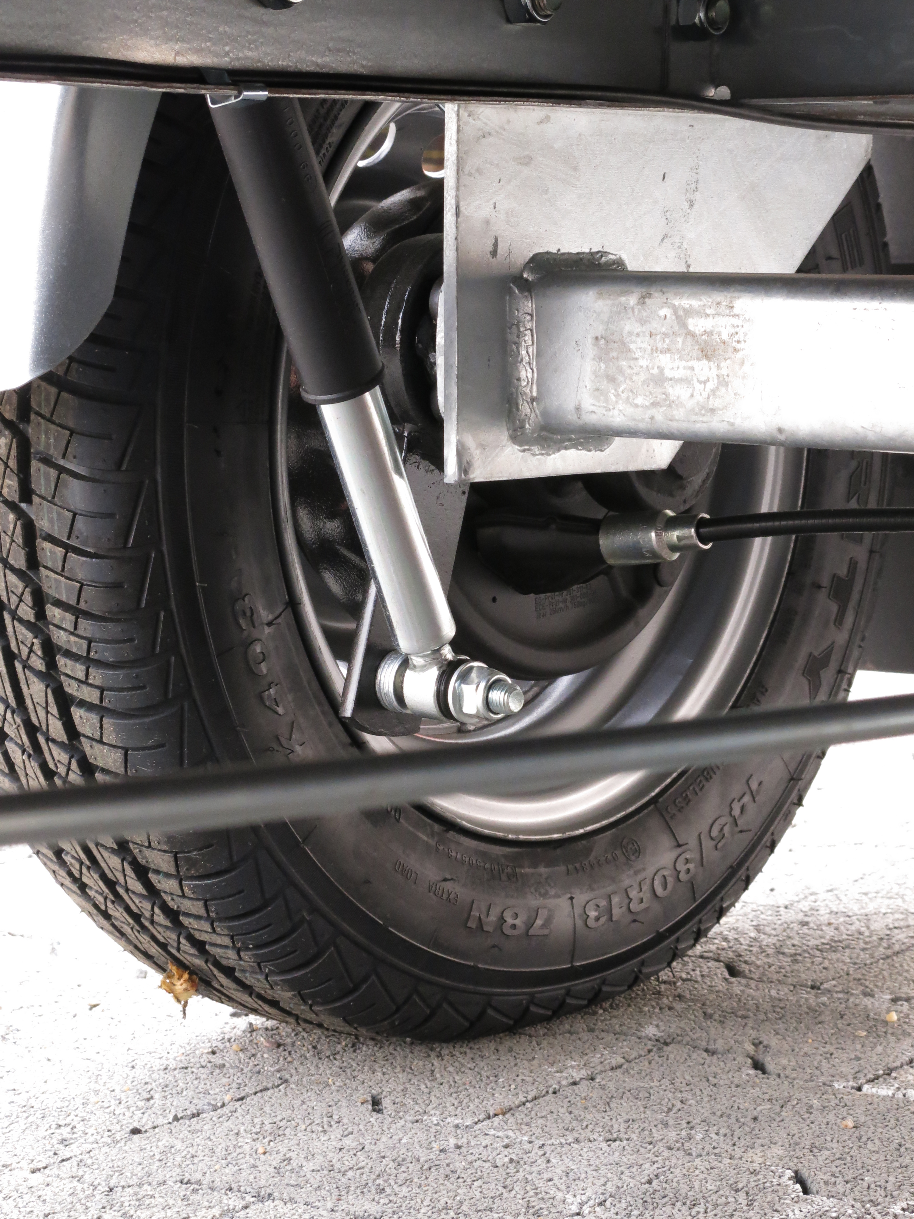 Anhänger mit 100 km/h Zulassung